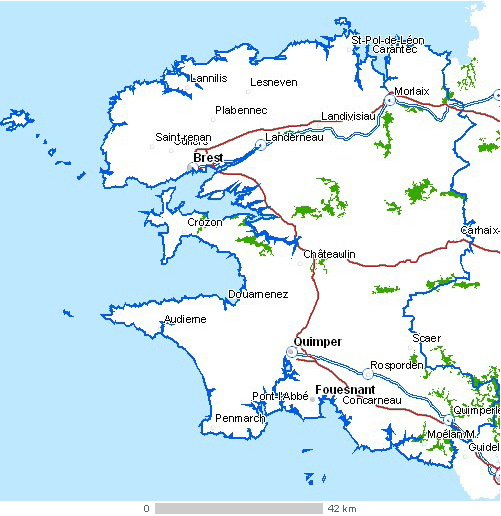 Carte du département Finistère Légende